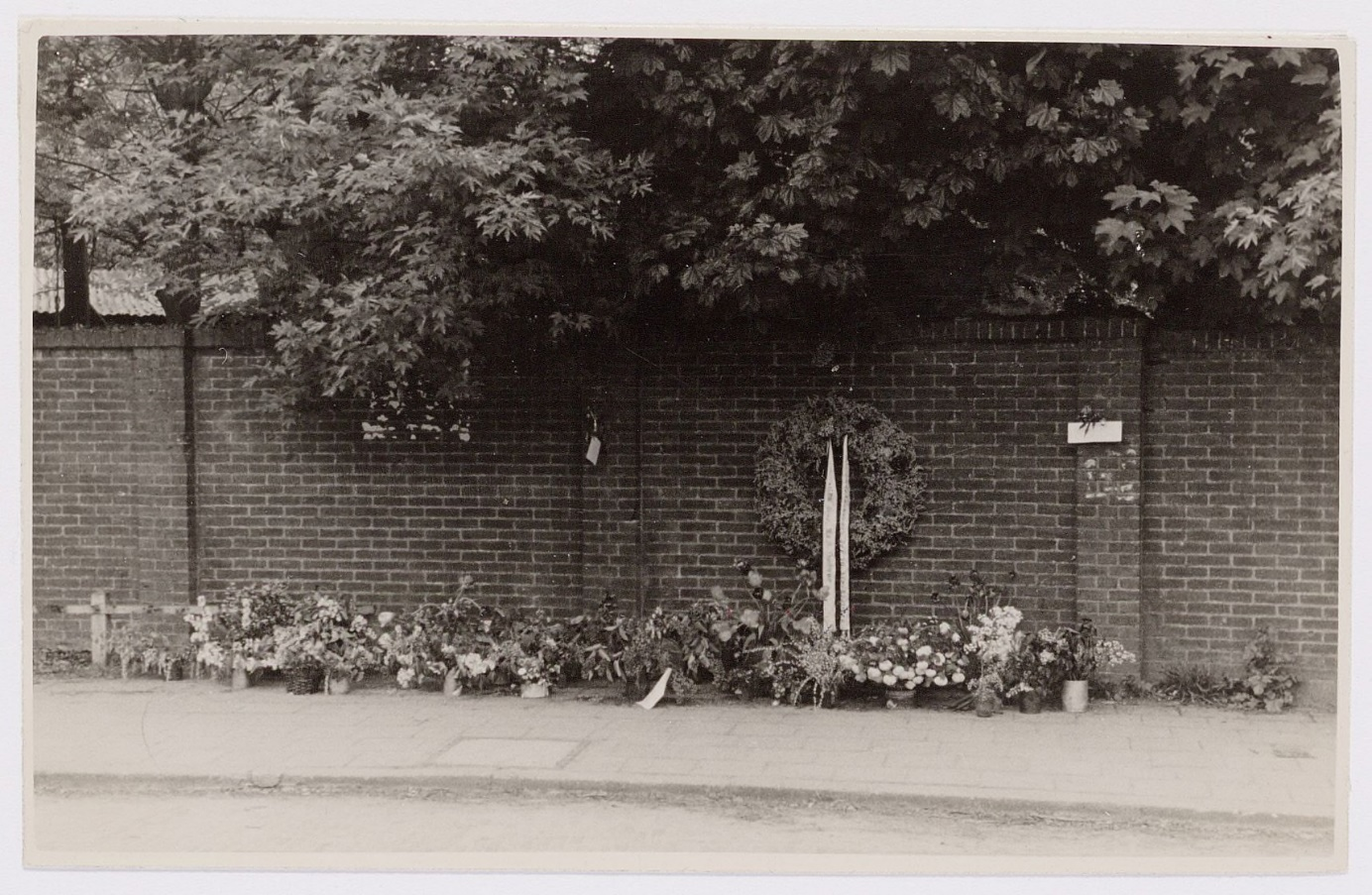 Executieplaats Apelweg,1945